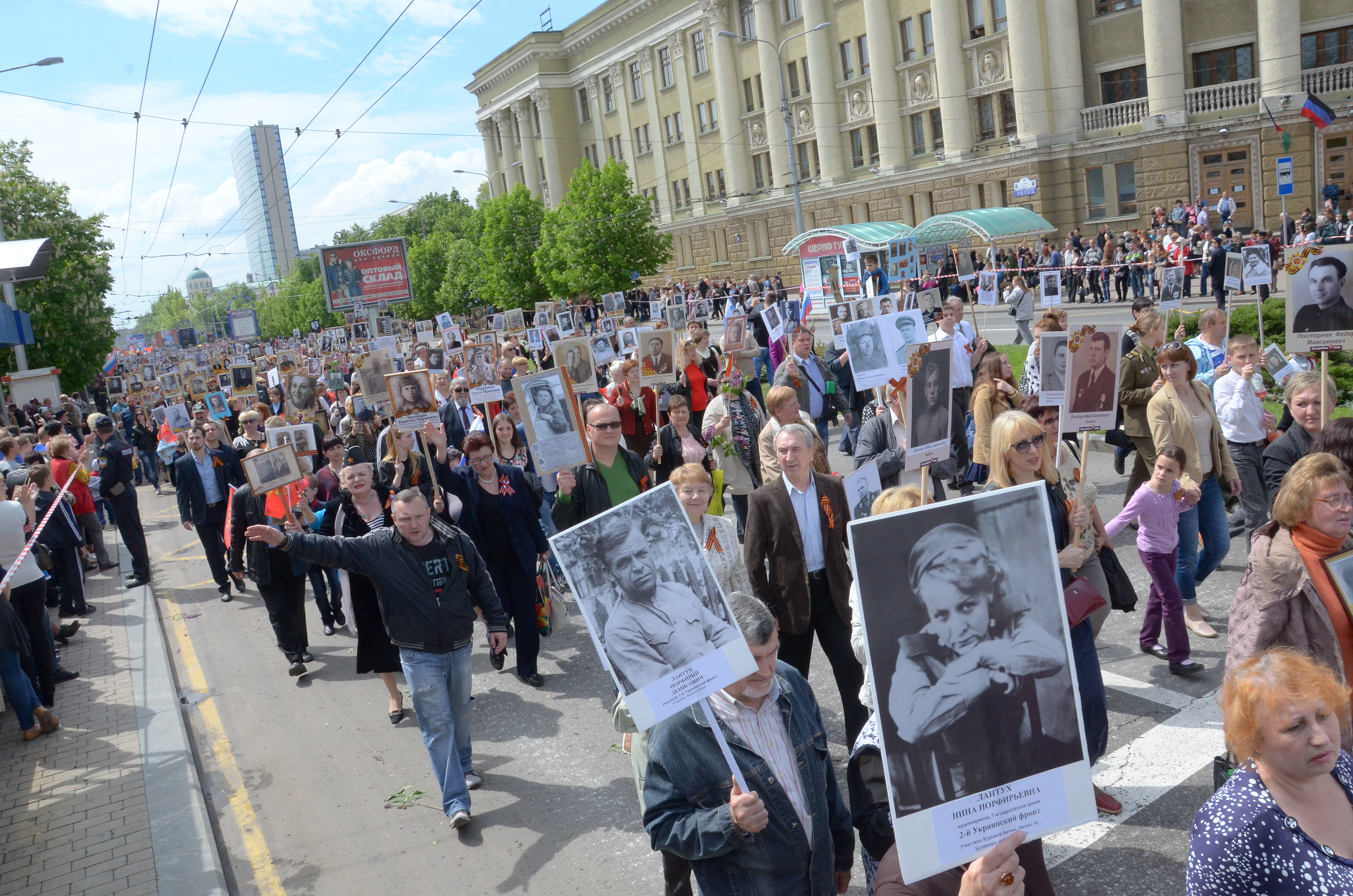 День Победы в Донецке